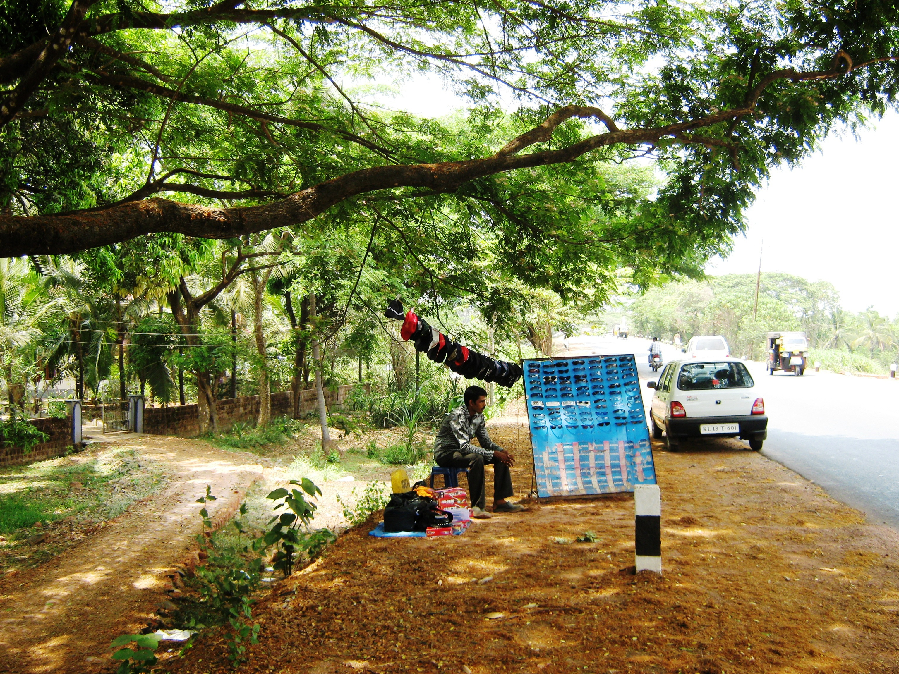 Payyannur, Kerala, India.